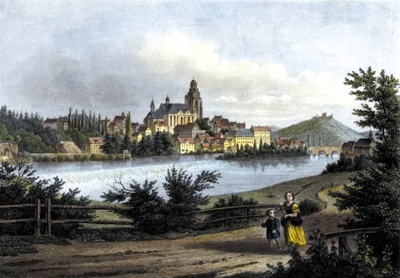 Wetzlar mit Dom und Burg Kalsmunt, kolorierter Stahlstich, 19. Jh.